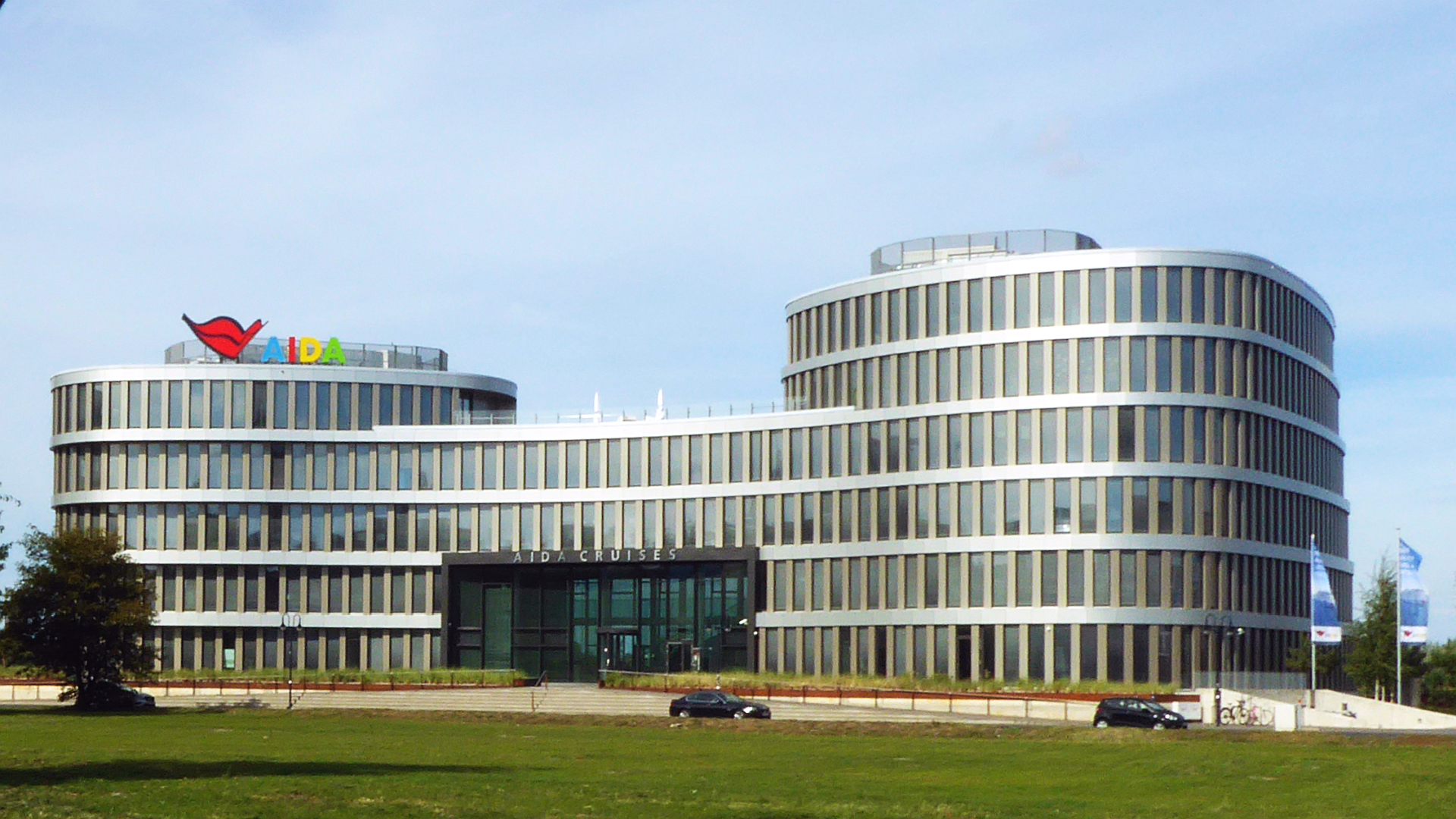 Hauptverwaltung der AIDA Cruises Branch of Costa Crociere in Rostock Am Strande - Foto 2018 © Wolfgang Pehlemann P1260658